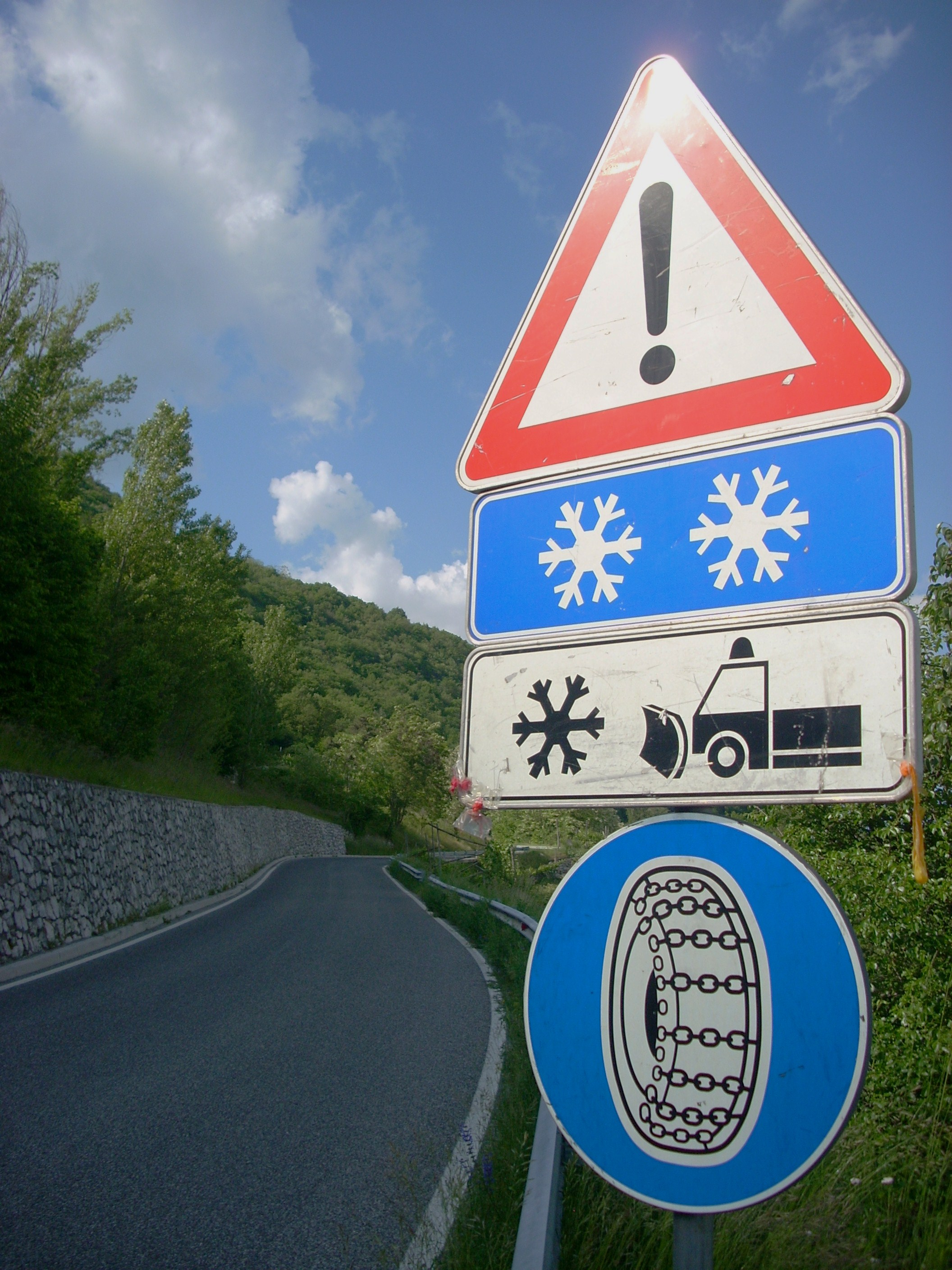 Cartello stradale di pericolo per neve e obbligo di catene, in Trentino (Italia)